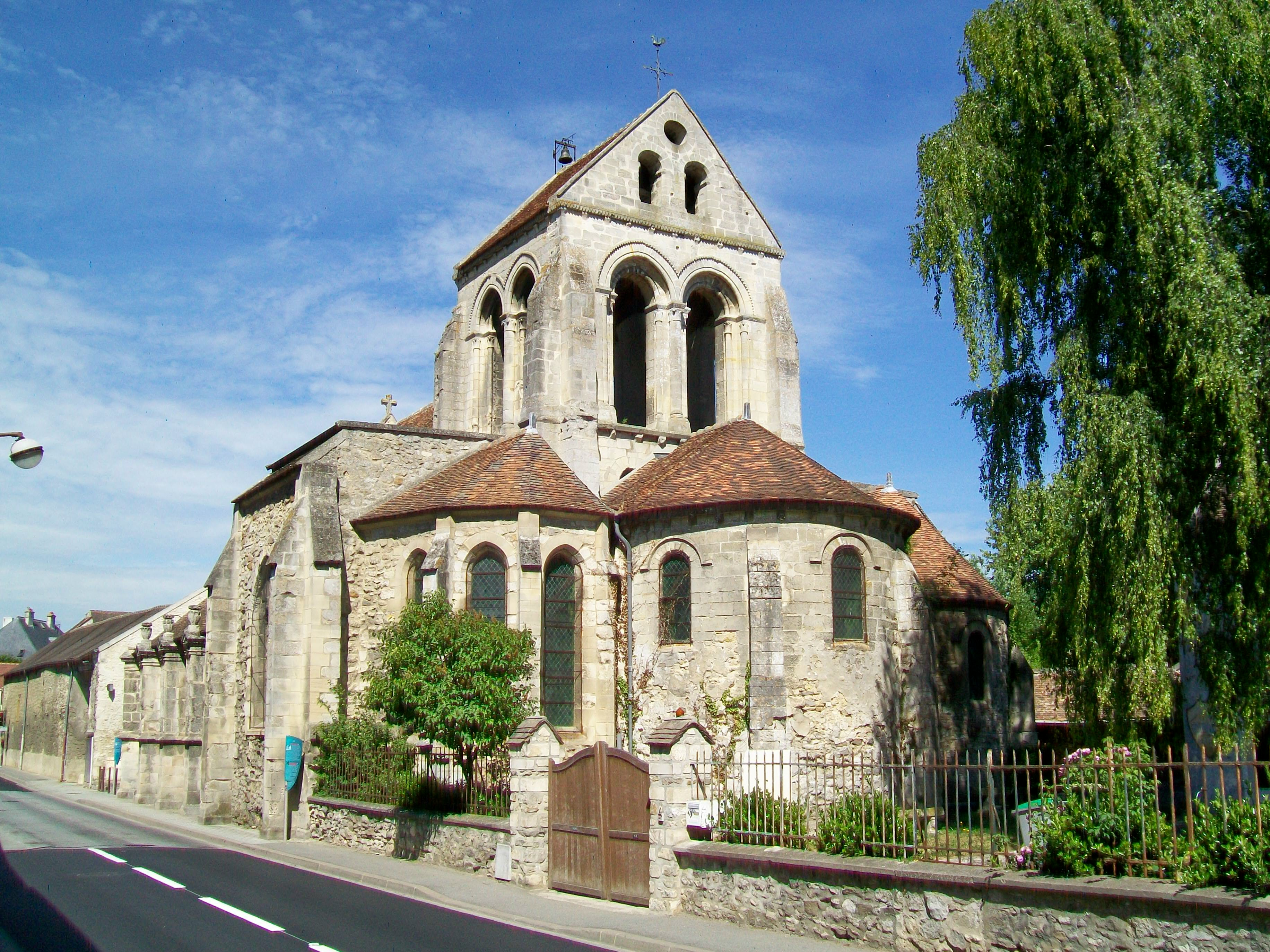 L'église Saint-Étienne de Fosses, dont le chœur et la partie centrale de la nef, de style romane, datent du XIIe siècle. L'on remarquera le rapport inhabituel des proportions entre la tour et la nef, et le transept à toits plats.